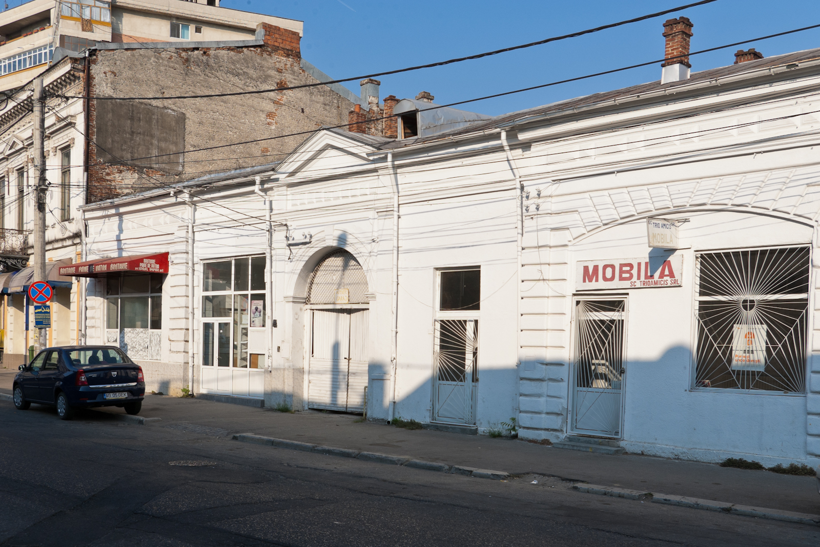 Fotografia prezinta casa cu spaţii comerciale de pe str. Sfânta Vineri 25, vazuta dinspre E.